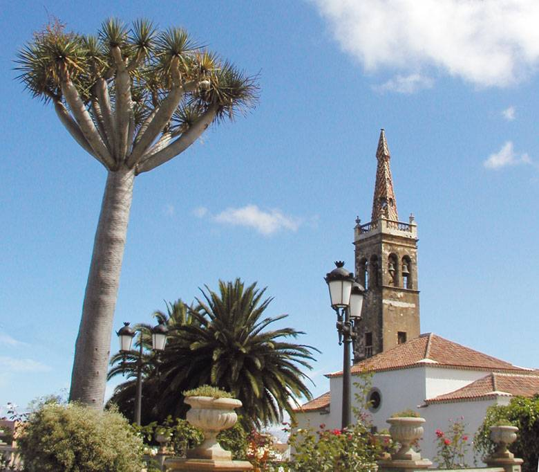 El templo parroquial del Apóstol Santiago desde la Plaza de la Unión.